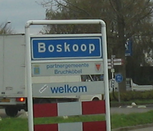 Boskoop bord